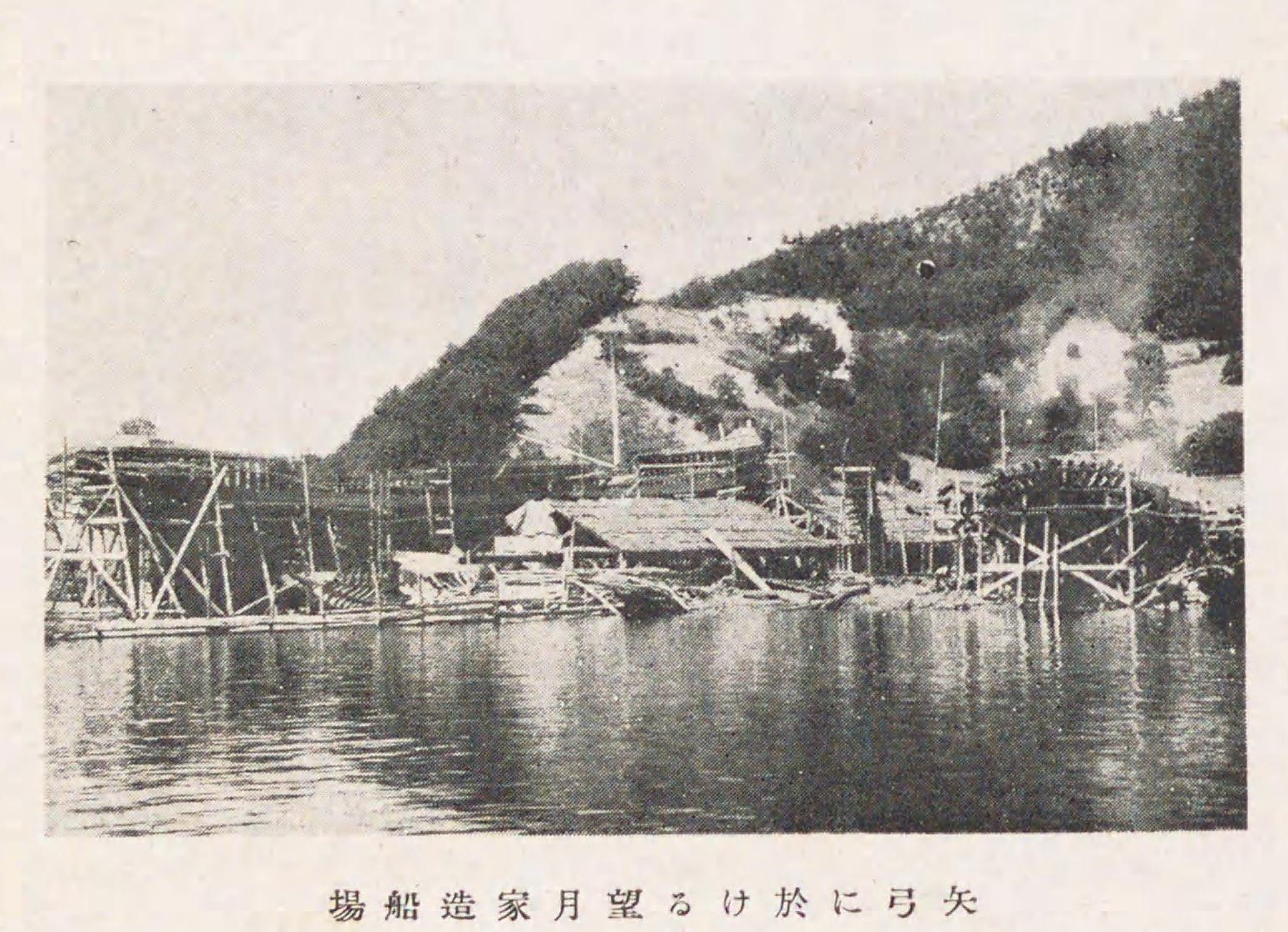 広島県大崎上島の造船場。明治から大正時代に廻船操業・造船業でならした望月家が所有した。